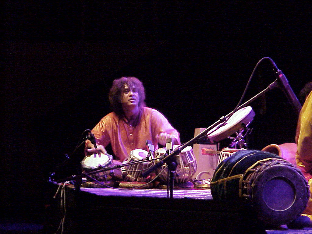 Zakir Hussain, Remember Shakti, Munich 2001